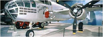 B-25J-30NC 44-86872 Little King Robins AFB Museum